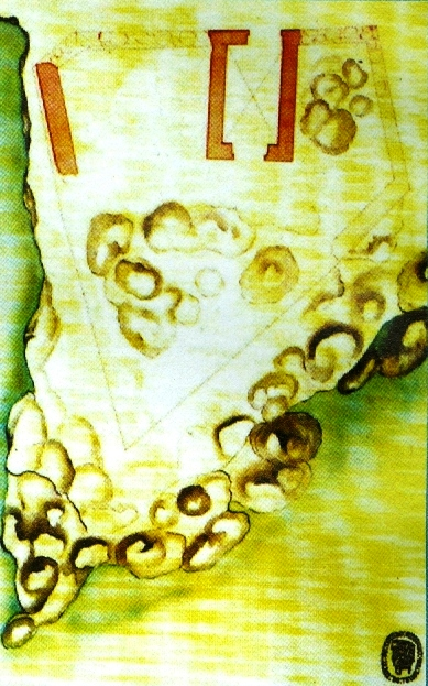 Forte dos Coelhos. MACHADO, Francisco Xavier. "Revista dos Fortes e Redutos da Ilha Terceira" (1772). in MARTINS, José Salgado, "Património Edificado da Ilha Terceira: o Passado e o Presente". Separata da "Atlântida", vol. LII, 2007. p. 28.